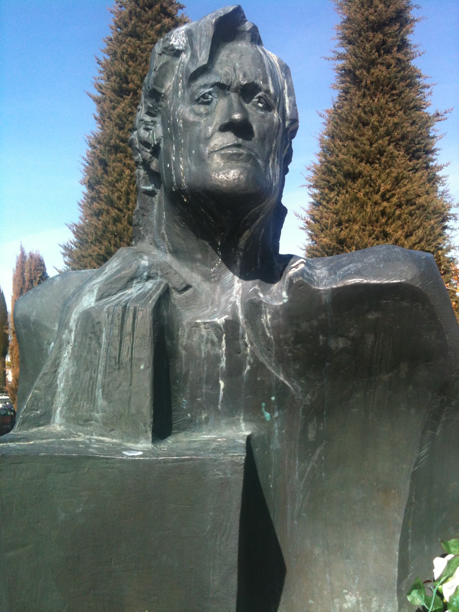 Monumento fúnebre en la tumba de Félix Rodríguez de la Fuente, en el cementerio de San José (Burgos, España). Escultura de Pablo Serrano.